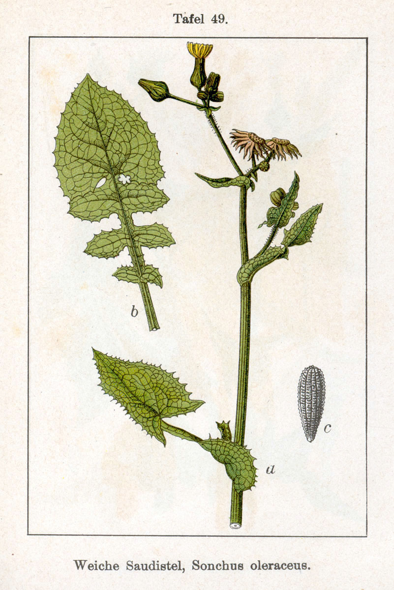 Sonchus oleraceus L. Original description Weiche Saudistel, Sonchus oleraceus